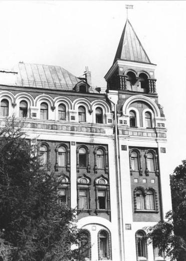 Доходный дом Миансаровой в начале XX века